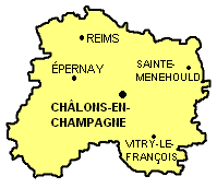 Carte schématique de la Marne (Champagne-Ardenne)